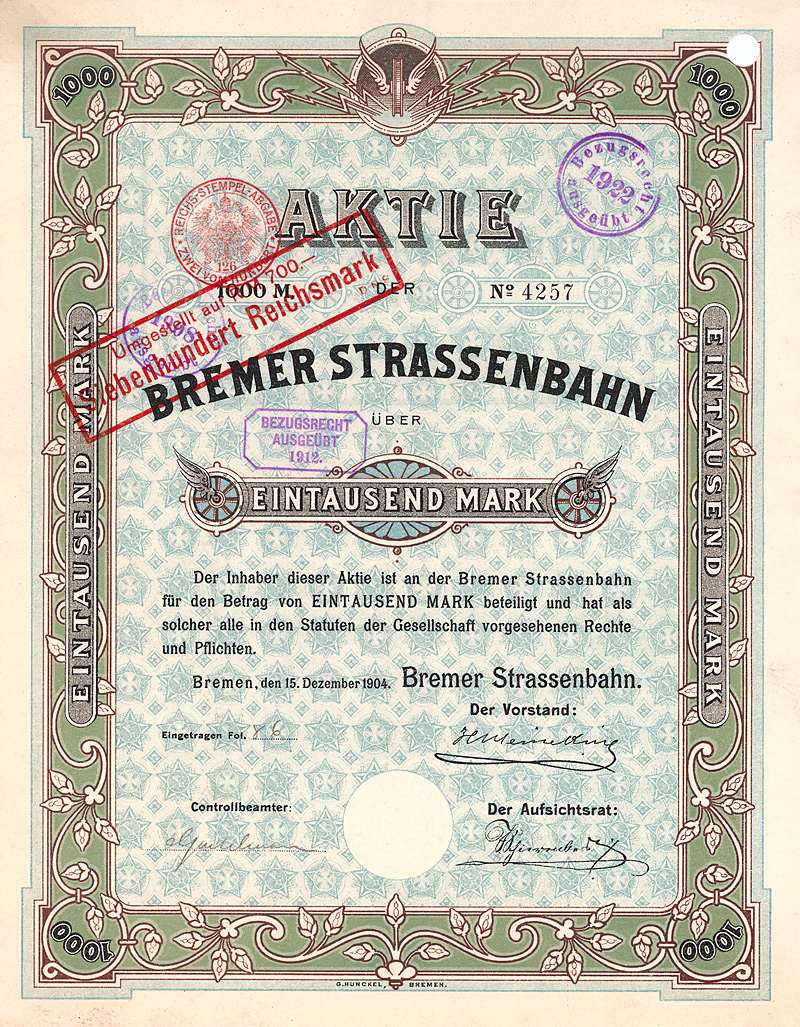 Aktie über 1000 Mark der Bremer Straßenbahn vom 15. Dezember 1904